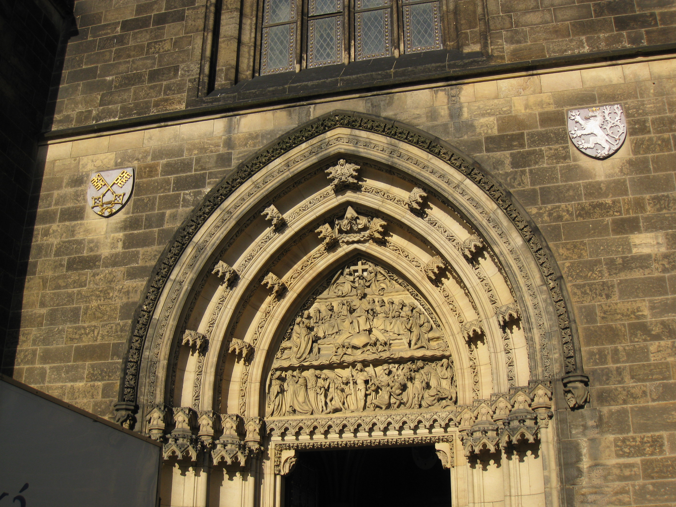 Pevnost Vyšehrad, Praha 2-Vyšehrad, Soběslavova 14/1, V pevnosti 16/2, 35/11, K rotundě 16/3, 81/6, 82/8, 90/12, 91/14, 92/16, 100/10, Štulcova 89/1, 102/2, 69/3